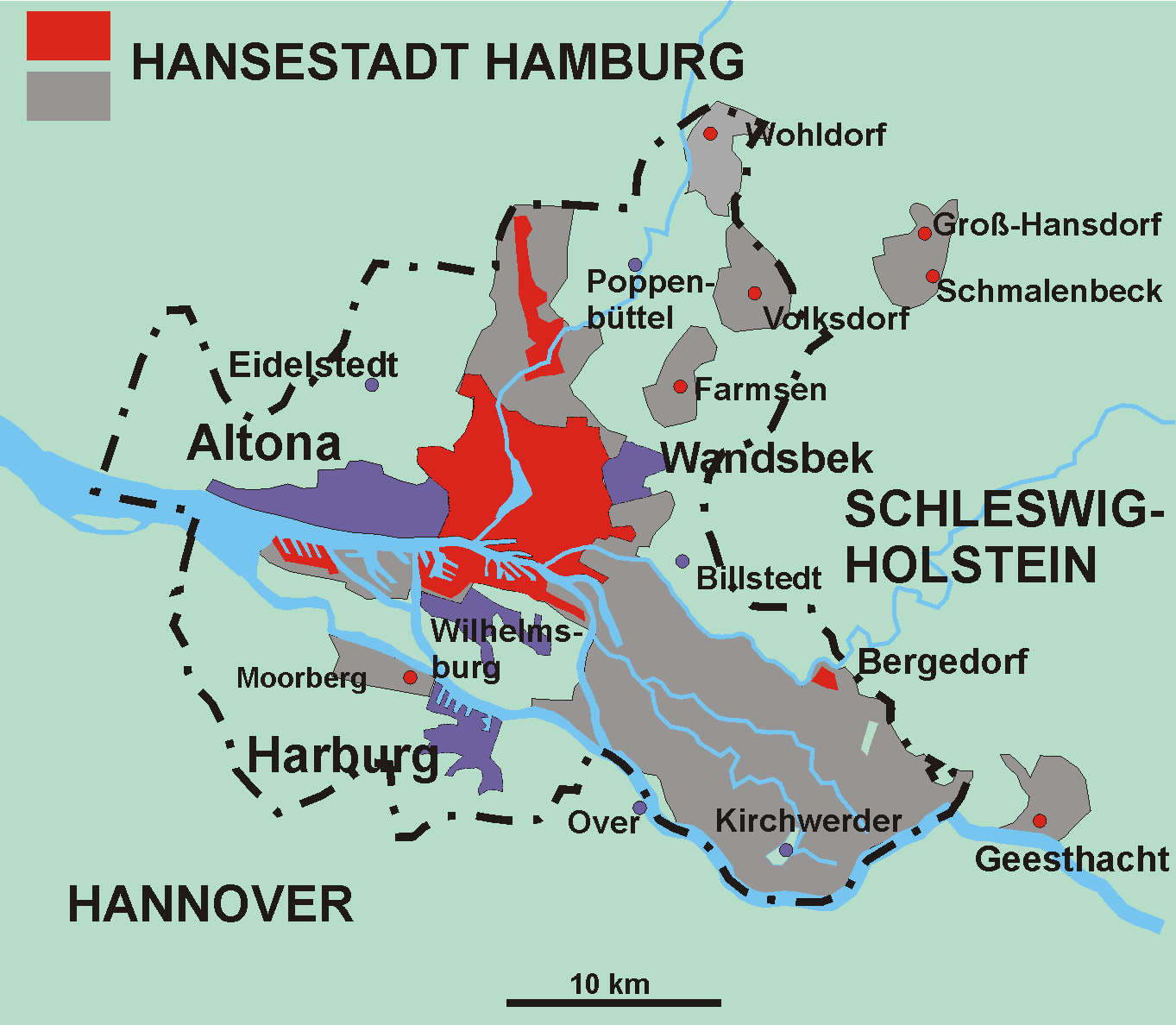 Karte von Hamburg 1815-1937 Rot: Hansestadt Hamburg 1815-1937 (rote Pkt. Exklaven) Lila: Preußische Städte wie Altona grau: zusätzliche heutige Stadtgebiete strichlierte Linie: Grenze des heutigen Hamburgs